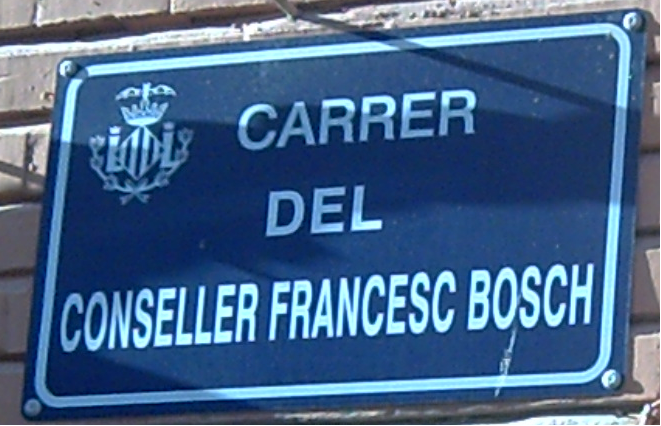 Imatge del rètol sobre el Carrer "Conseller Francesc Bosch i Morata" a la ciutat de València.